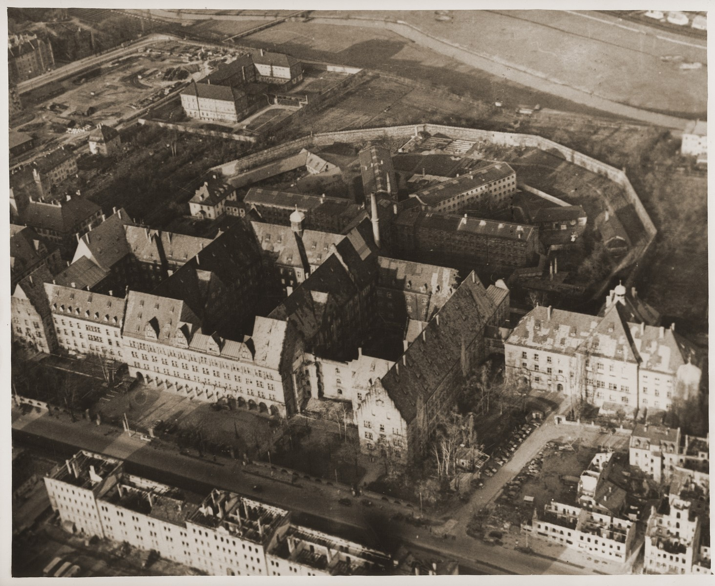 Luftaufnahme der Justizgebäude an der Fürther Straße in Nürnberg im November 1945